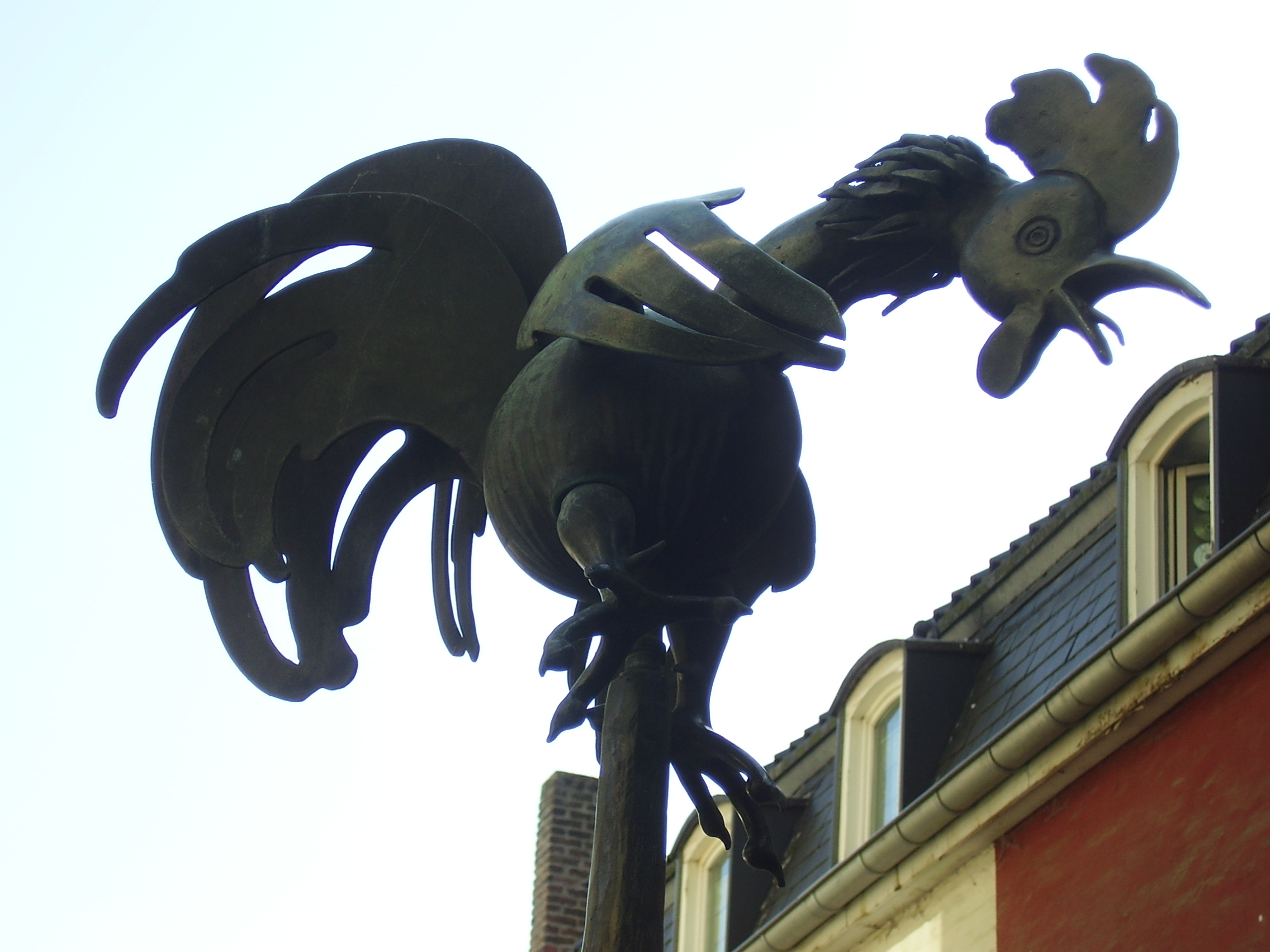 Puppenbrunnen in Aachen